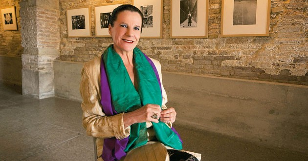 Ziva Kraus